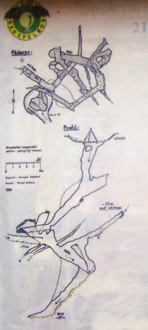 Mapa jeskyně Arnika, jak visí na tabuli vedle jeskyně